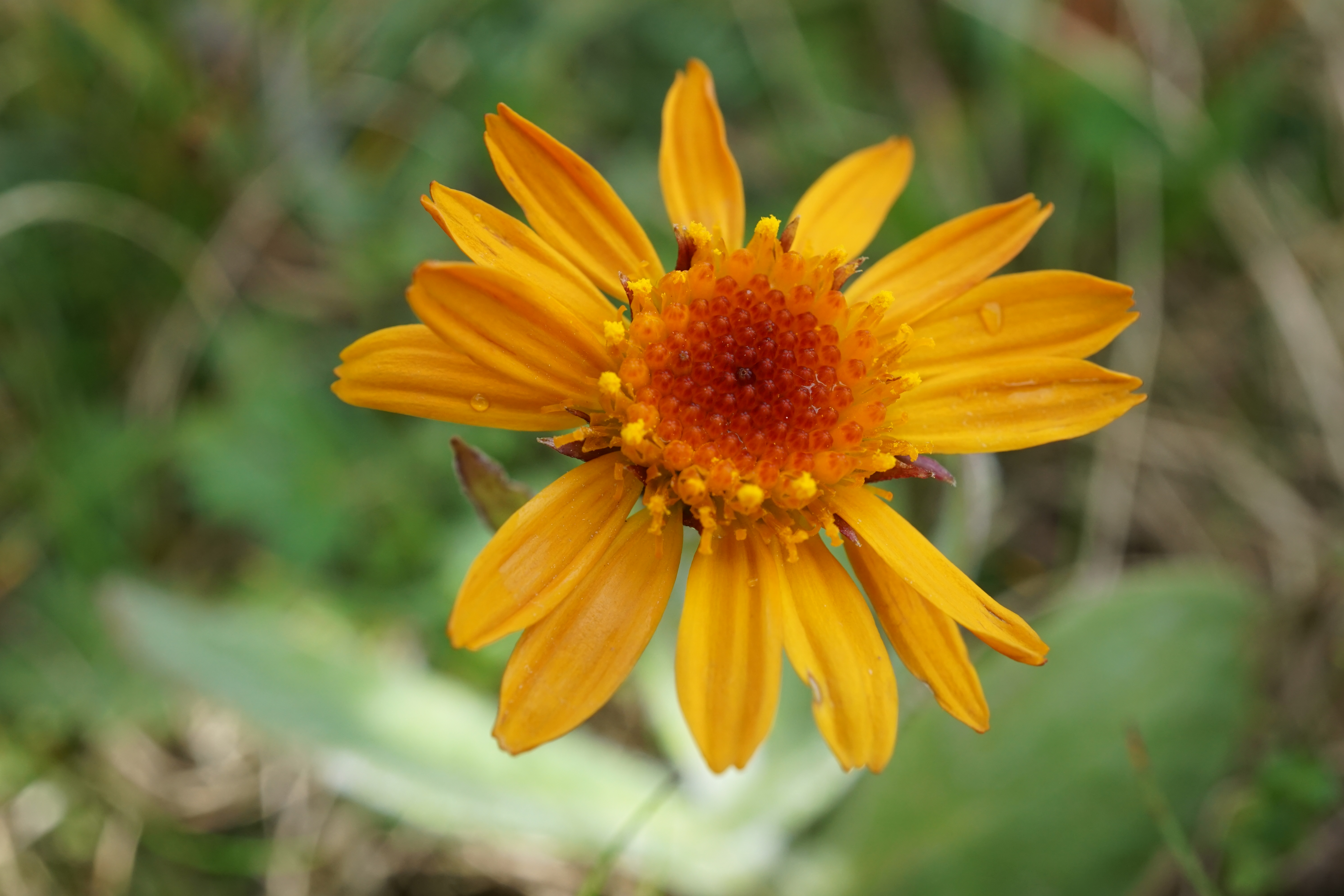 Cruciuliță lânoasă (Tephroseris integrifolia subsp. capitata) fotografiată pe vârful Coștila, Munții, Bucegi, România